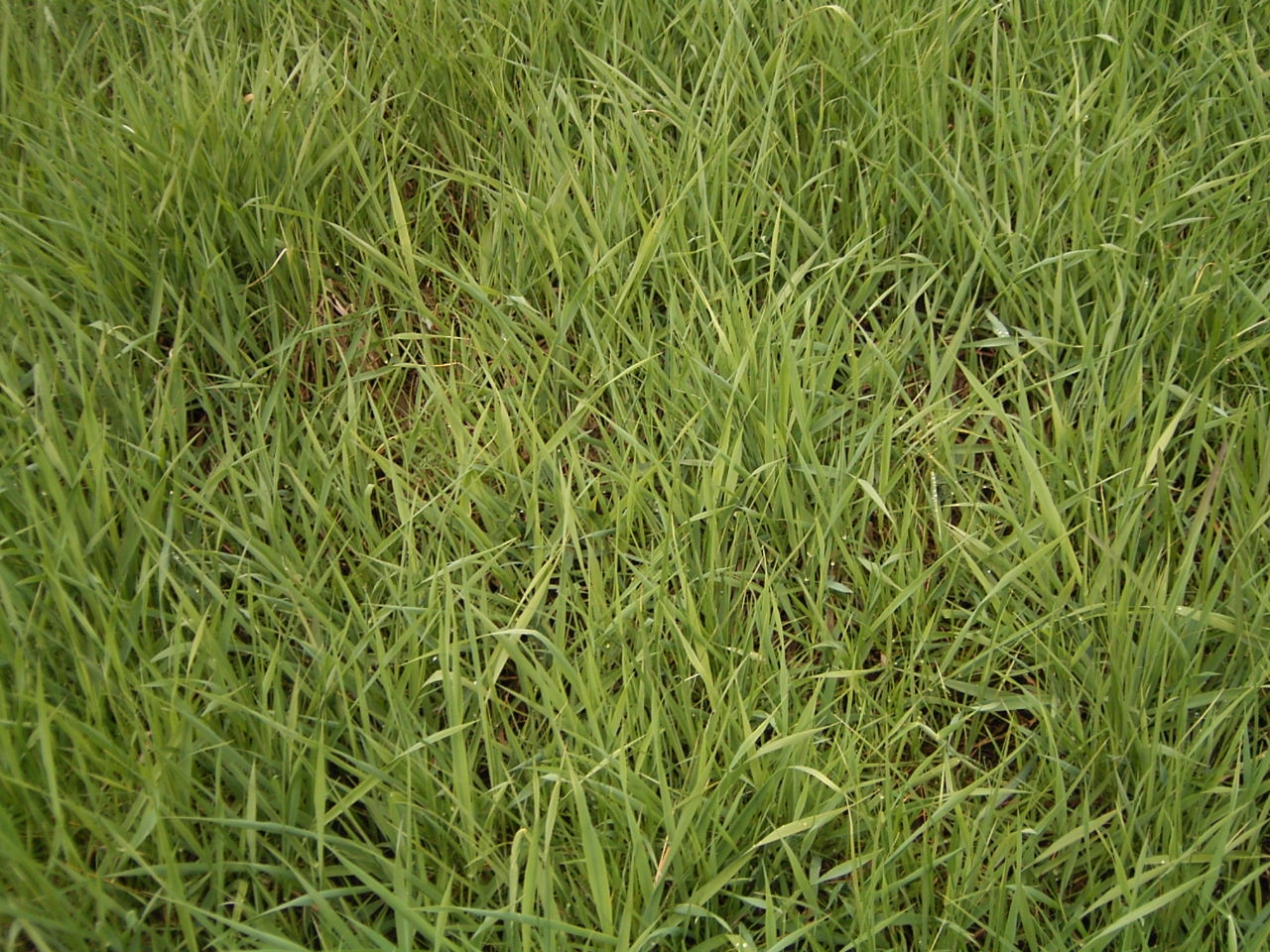 Gras, Intensivgrünland